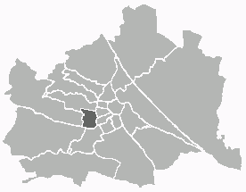 Positionskarte des 15. Wiener Gemeindebezirks Unter Verwendung einer Vorlage von Extrawurst. Public Domain.